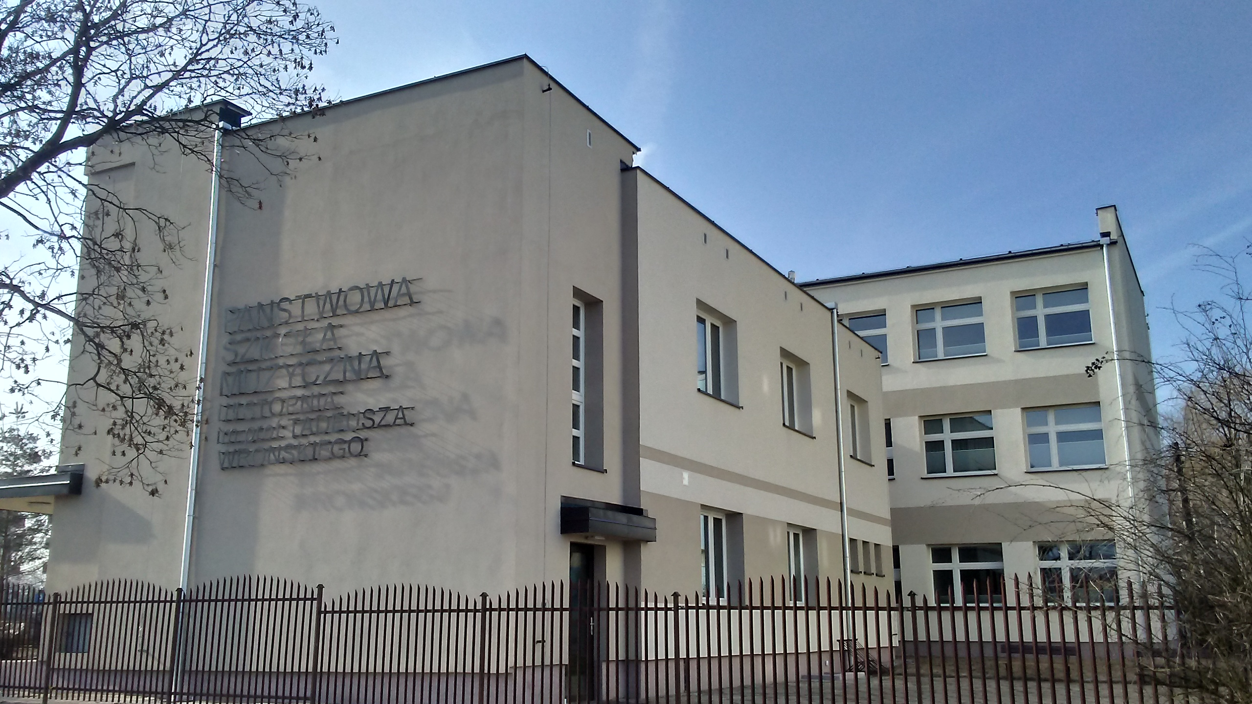 Szkola muzyczna w Tomaszowie Mazowieckim (I i II stopnia), w czasie okupacji niemieckiej, siedziba tomaszowskiego Gestapo